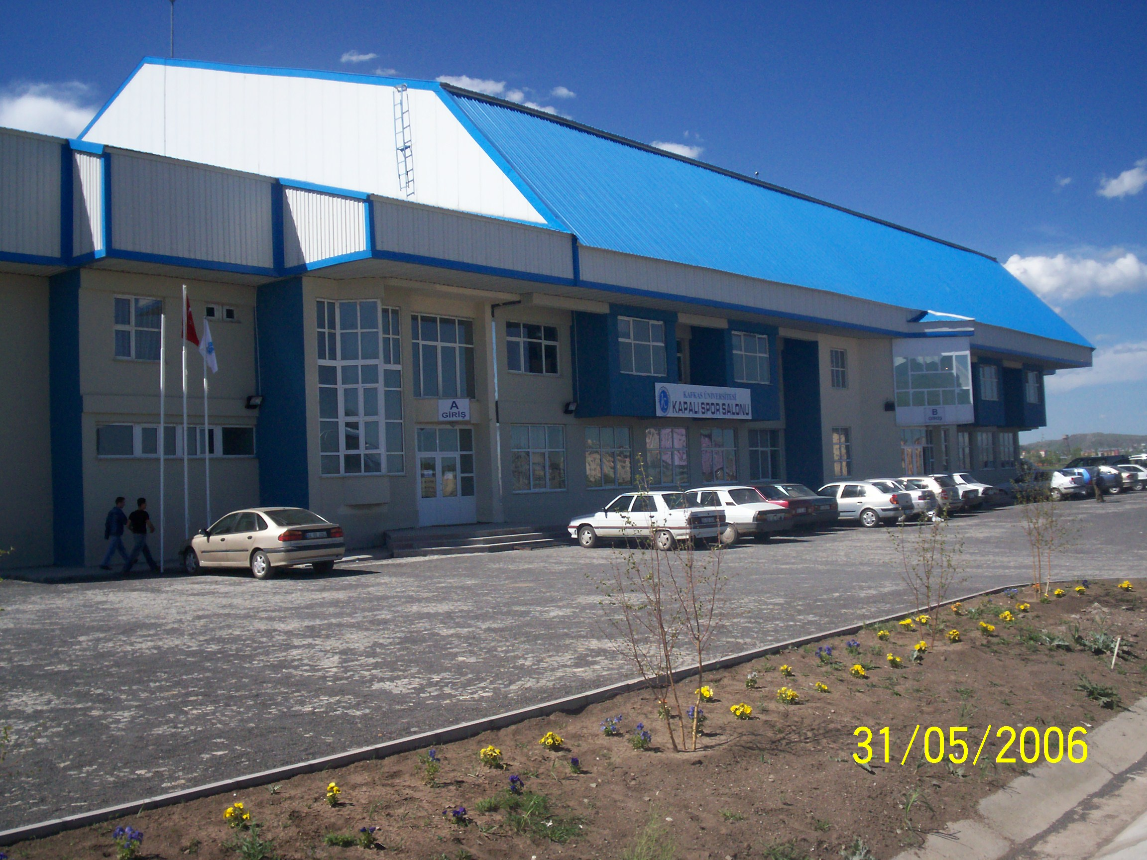 kafkas_üni._fen_edebiyat